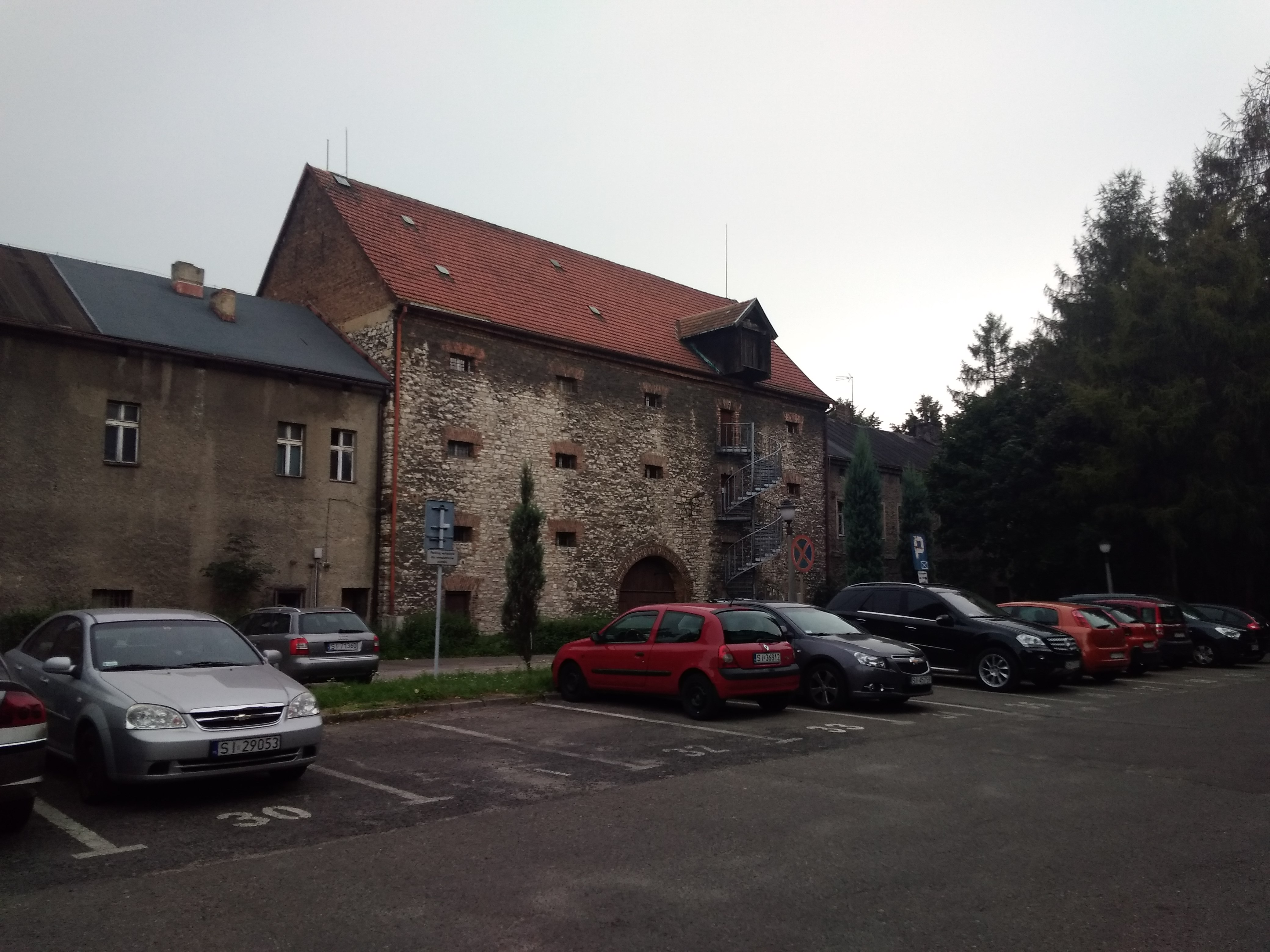 Muzeum Miejskie w Siemianowicach Śląskich od tylnej strony